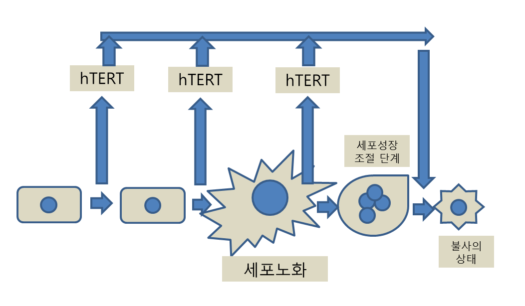 프레임